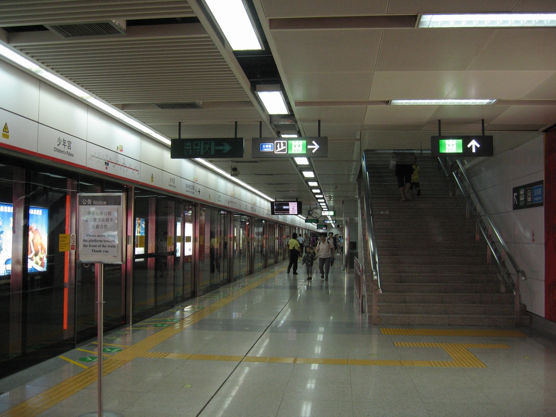 深圳地铁少年宫站站台